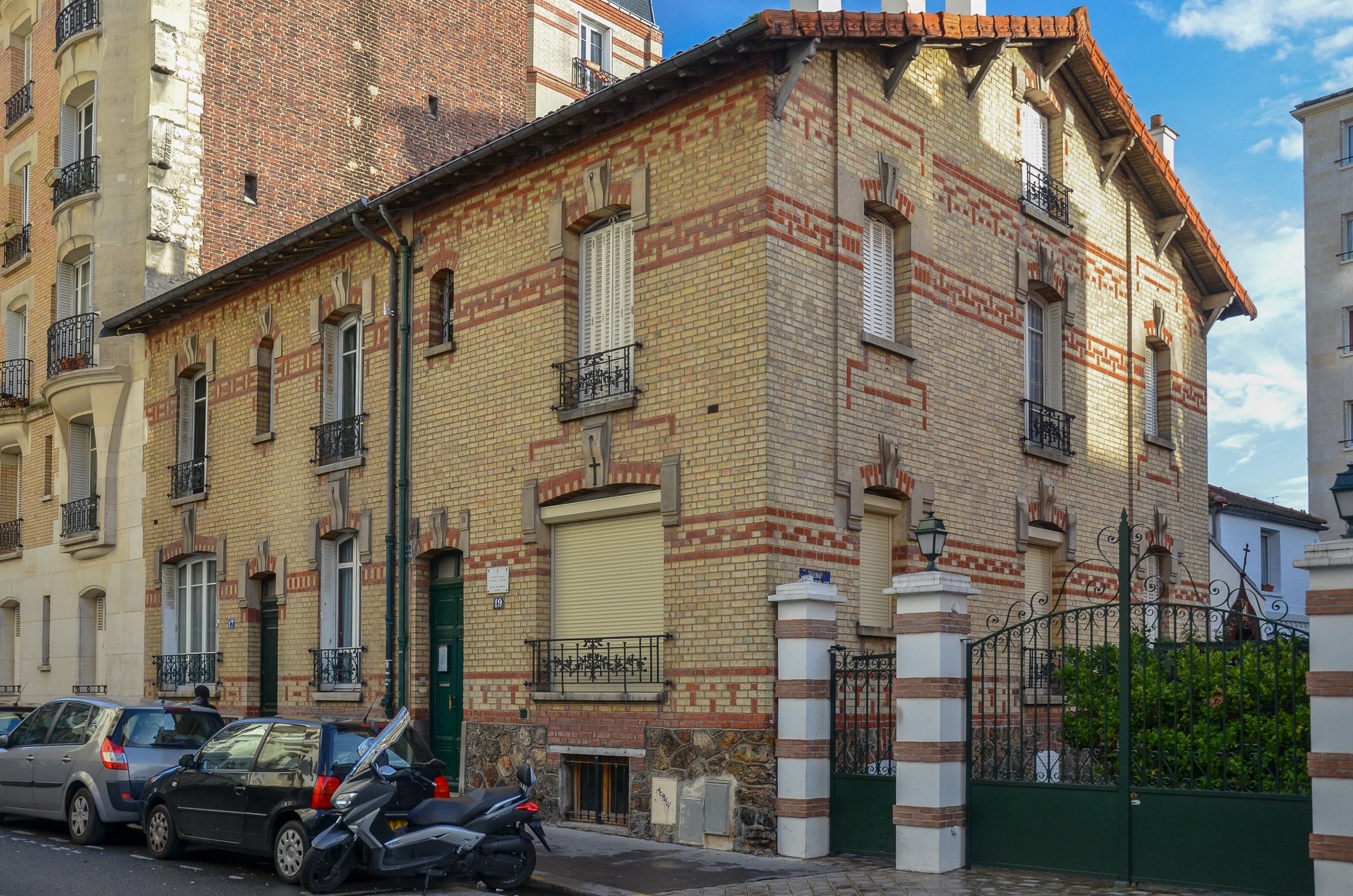 Здание по улице Клод Лоррен в Париже, в котором располагалась церковь Всех святых, в земле Российской просиявших, открытая свт. Иоанном Шанхайским и Сан-Францисским.